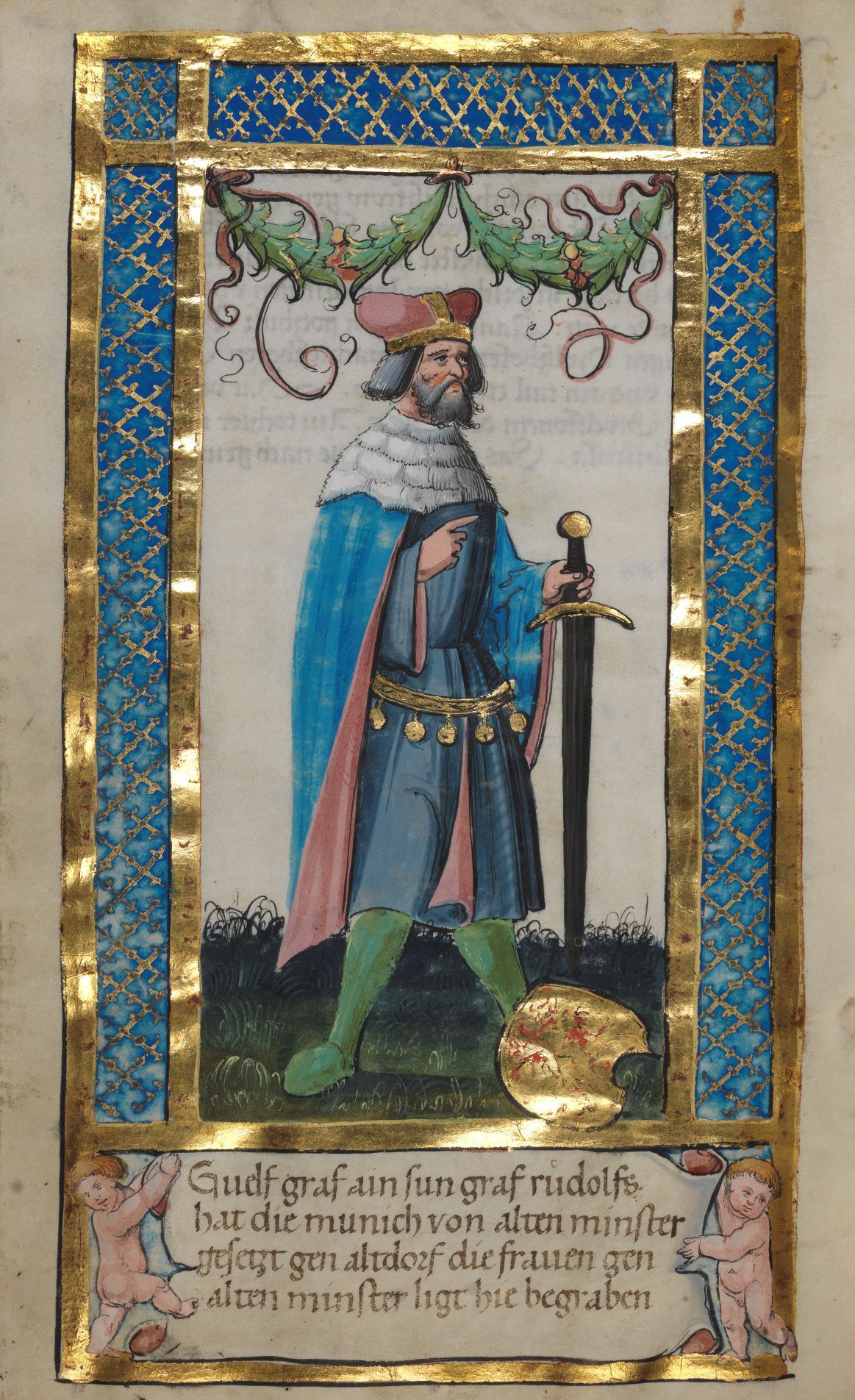 Weingartener Stifterbüchlein, Württembergische Landesbibliothek Stuttgart, Cod.hist.qt.584, fol. 21v, Stifterbild Welf II. Guelf graf ain sun graf rudolfs hat die munich von alten minster gesetzt gen altdorf die frauen gen alten minster ligt hie begraben